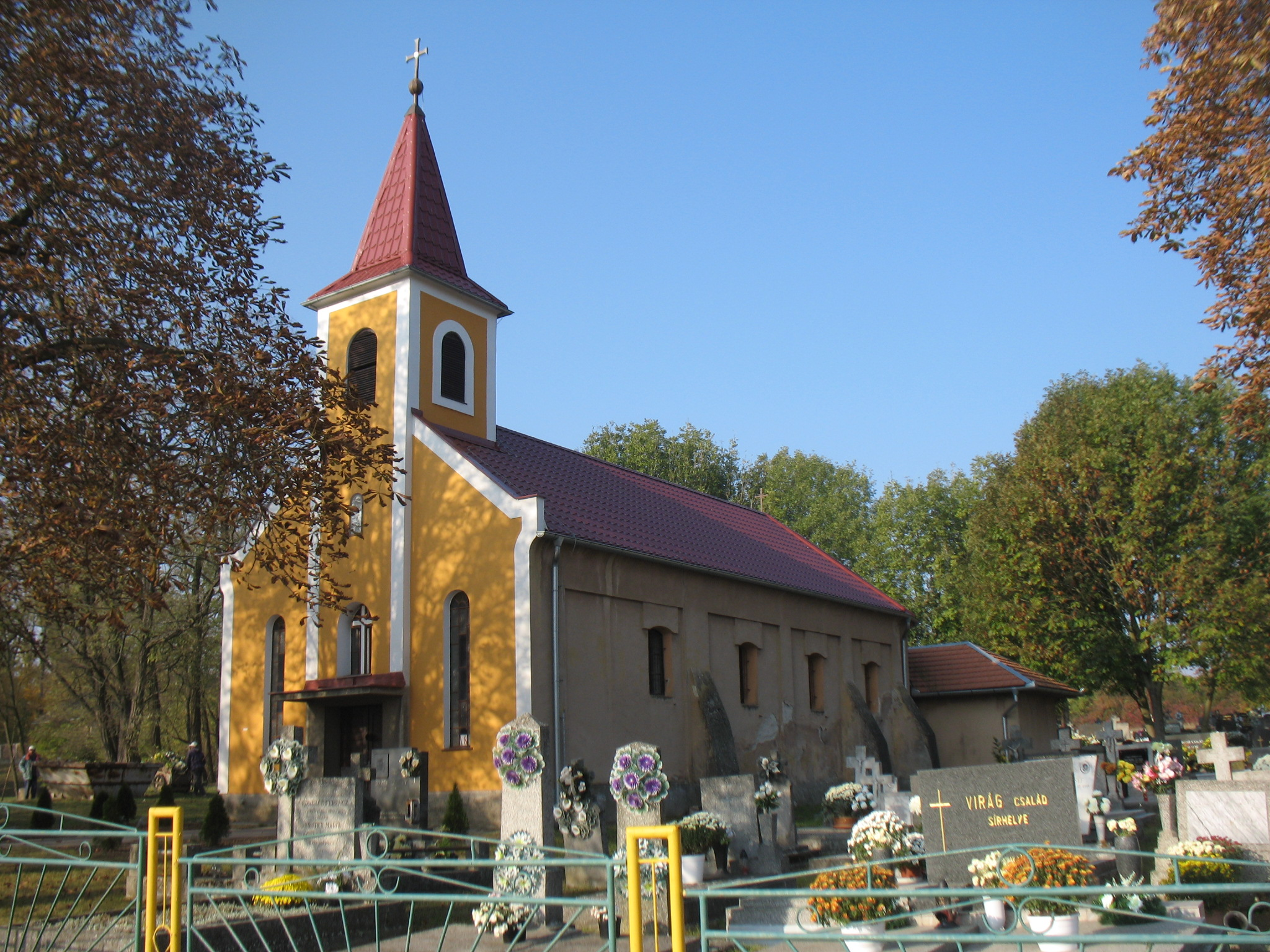 Garamlök temploma